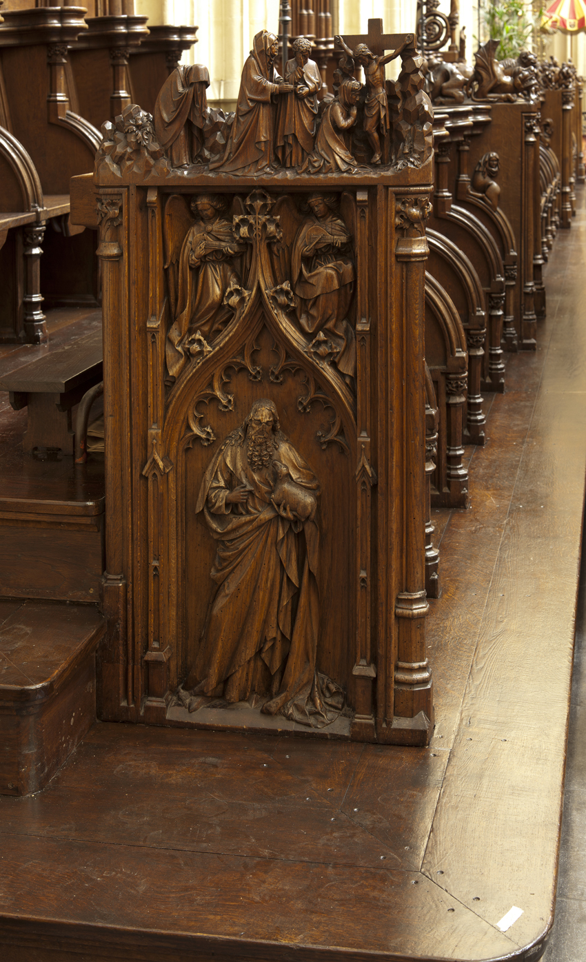 koorgestoelte, noordzijde, 15e